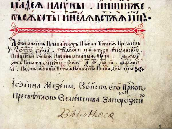 Запис Михайла Василієвича на аркуші 3.